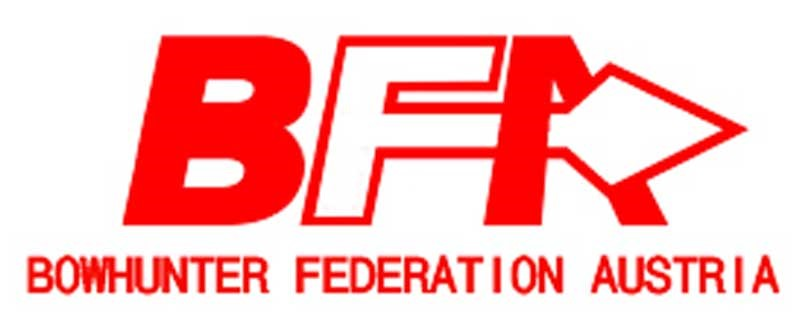 Bowhunting Federation Austria